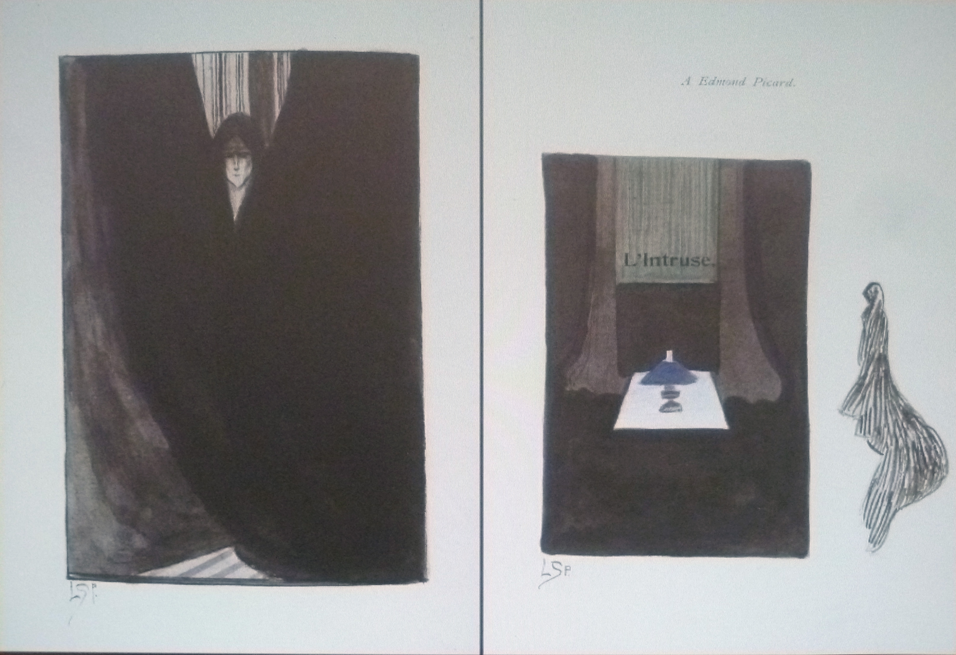 "L'Intruse" (1890), theaterstuk door Maurice Maeterlinck; links: "Gevleugelde figuur" ; rechts : "Interieur en figuur", titelillustratie; illustraties door Léon Spilliaert (1903); potlood, Oost-Indische inkt, pen, kleurpotlood, aquarel op papier; privébezit